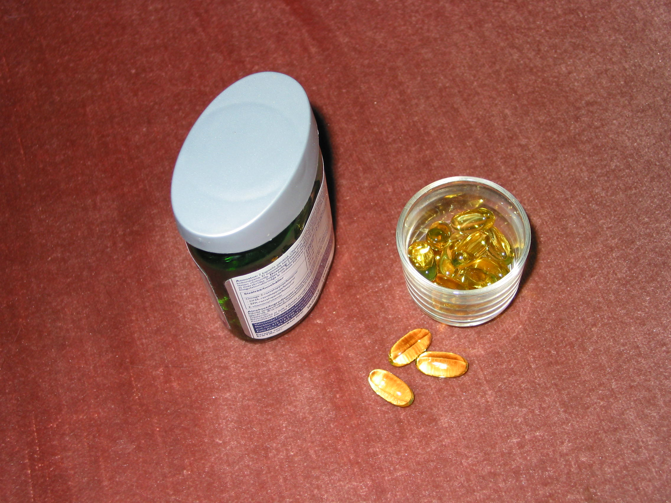 Kalaöljy kapseleita Fish oil capsules